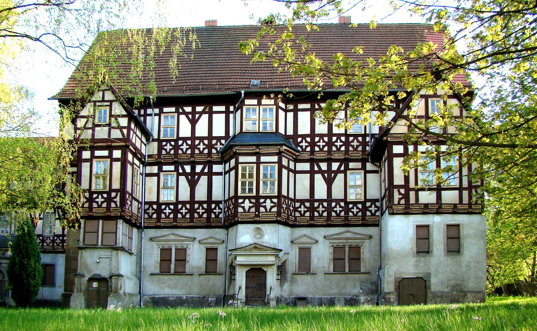 Rotes Schloss Mihla Hauptgebäude von vorn